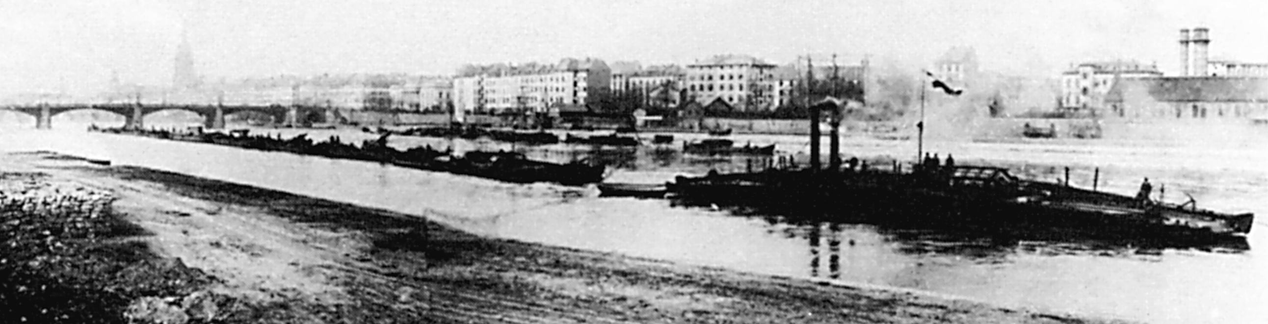 Kettendampfer auf dem Main bei Frankfurt am Main, um 1896.